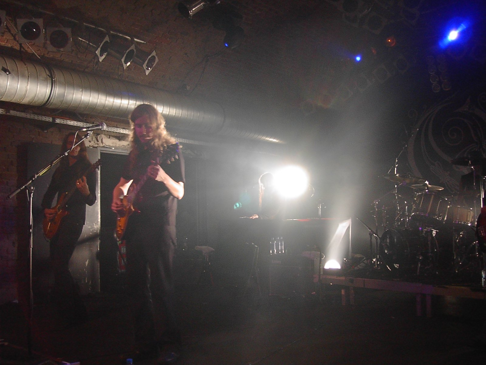 Opeth playing in the club "Matrix" in Bochum, Northrine-Westfalia, Germany